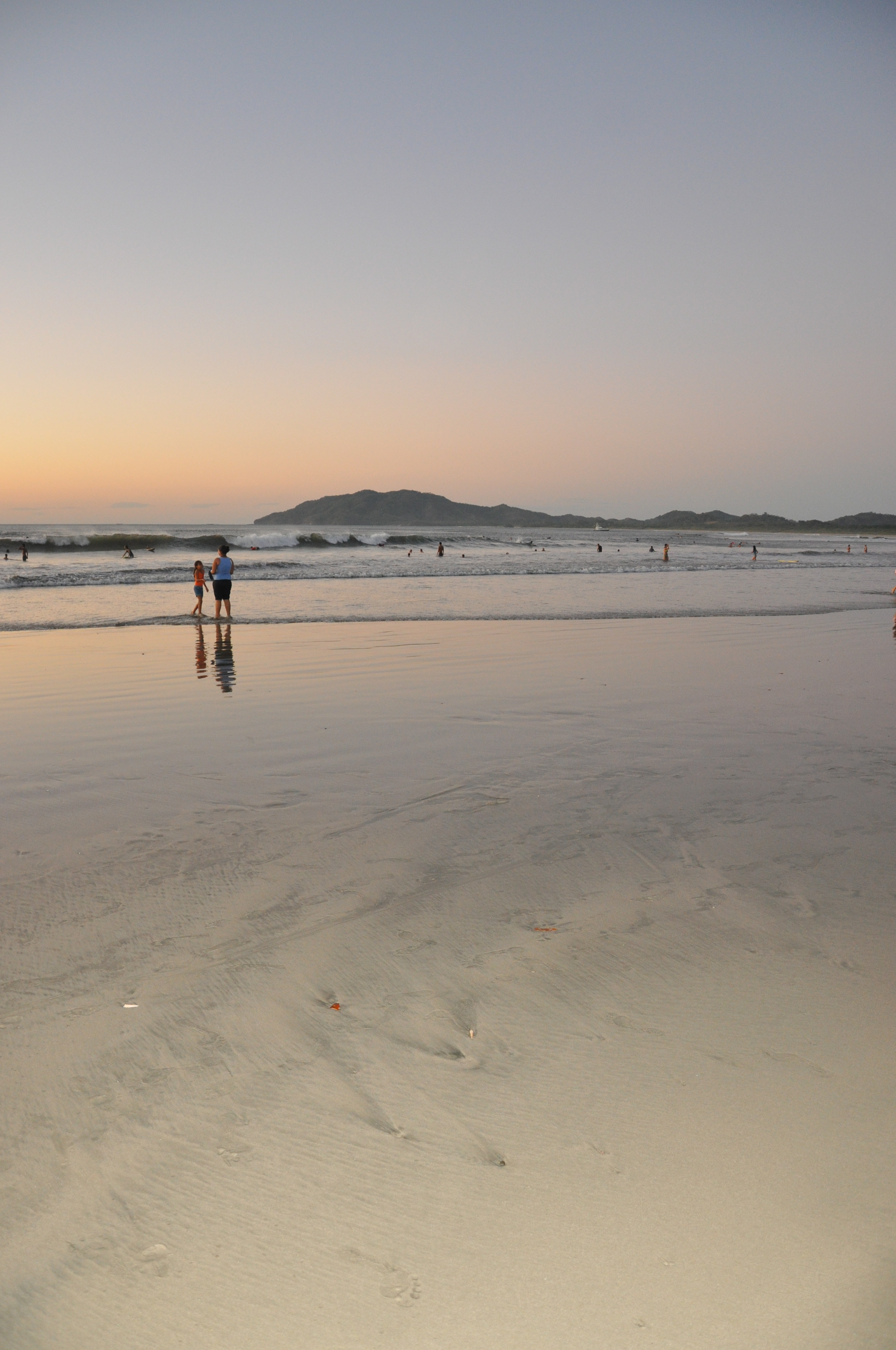 Playa Tamarindo, Guanacaste, Costa Rica.